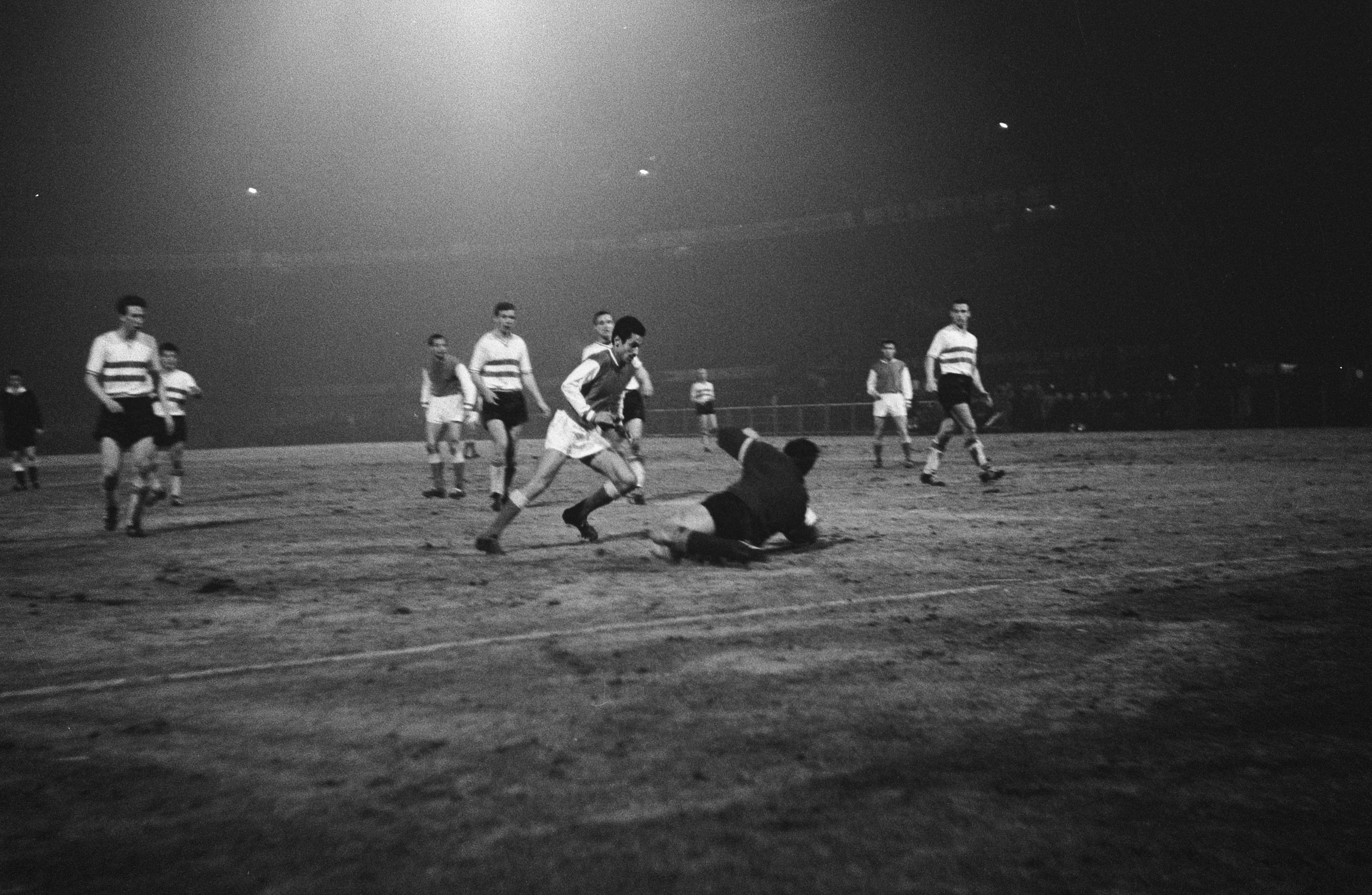 Collectie / Archief : Fotocollectie Anefo Reportage / Serie : [ onbekend ] Beschrijving : Europa Cup 1. Feyenoord tegen Reims 1-1. Spelmomenten Datum : 13 maart 1963 Locatie : Rotterdam, Zuid-Holland Trefwoorden : sport, voetbal Instellingsnaam : Feyenoord Fotograaf : Koch, Eric / Anefo Auteursrechthebbende : Nationaal Archief Materiaalsoort : Negatief (zwart/wit) Nummer archiefinventaris : bekijk toegang 2.24.01.05 Bestanddeelnummer : 914-9207